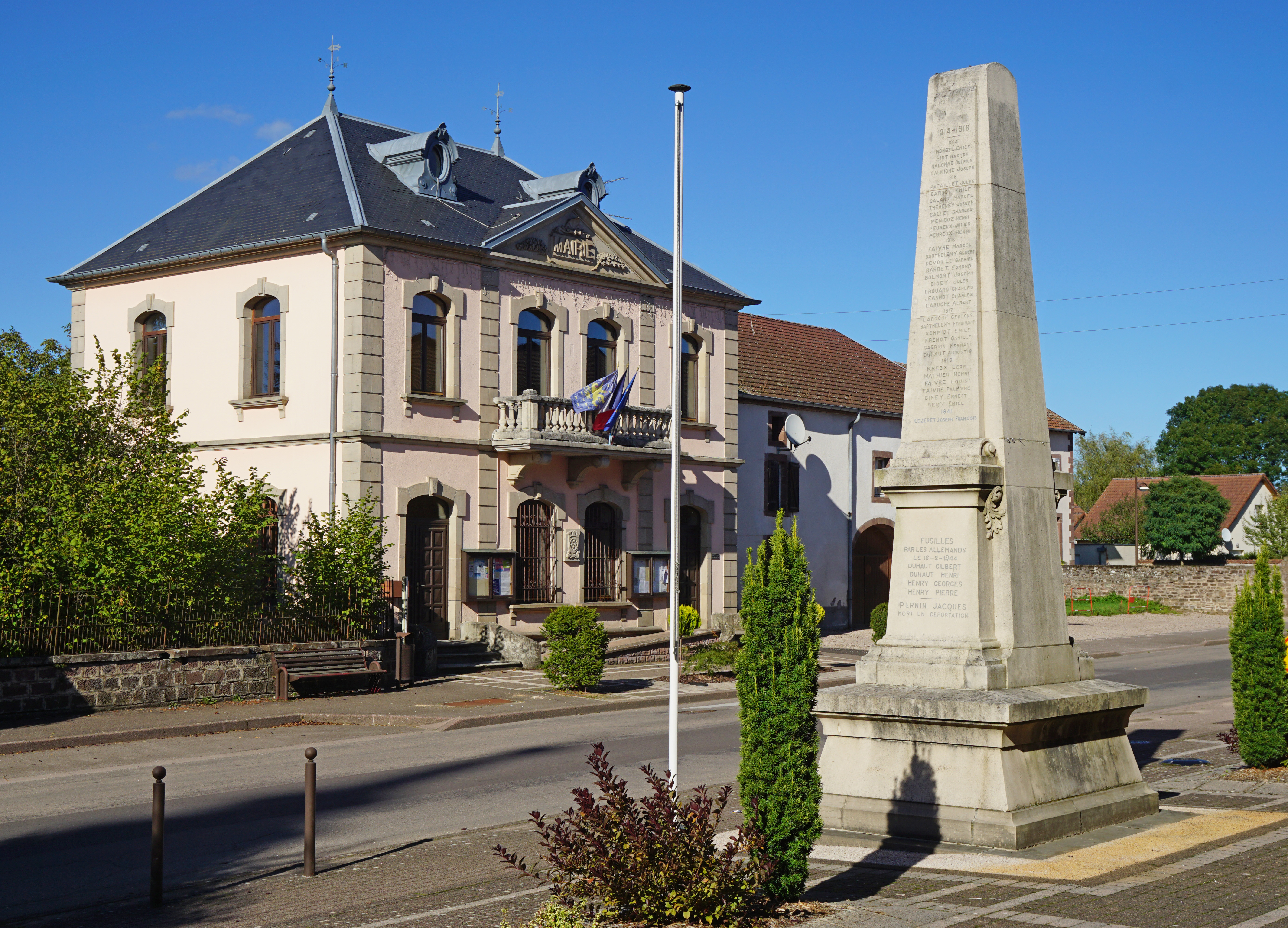 La mairie et le monument aux morts de Corbenay.